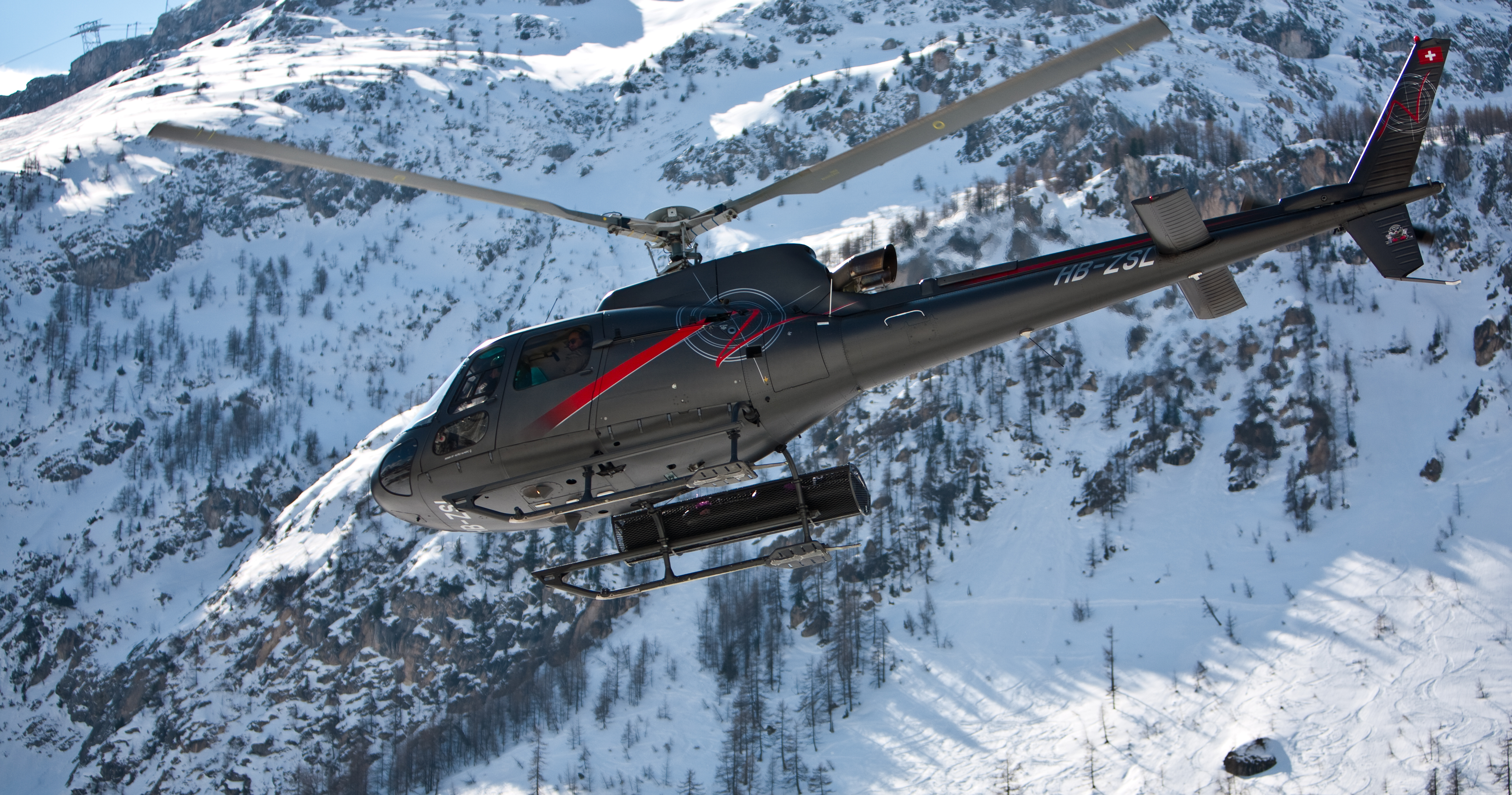 Services médicaux aériens : évacuation médicale par Airbus Helicopters H125 / Eurocopter AS350 B3 (HB-ZSL). Val d'Isère (38) France.